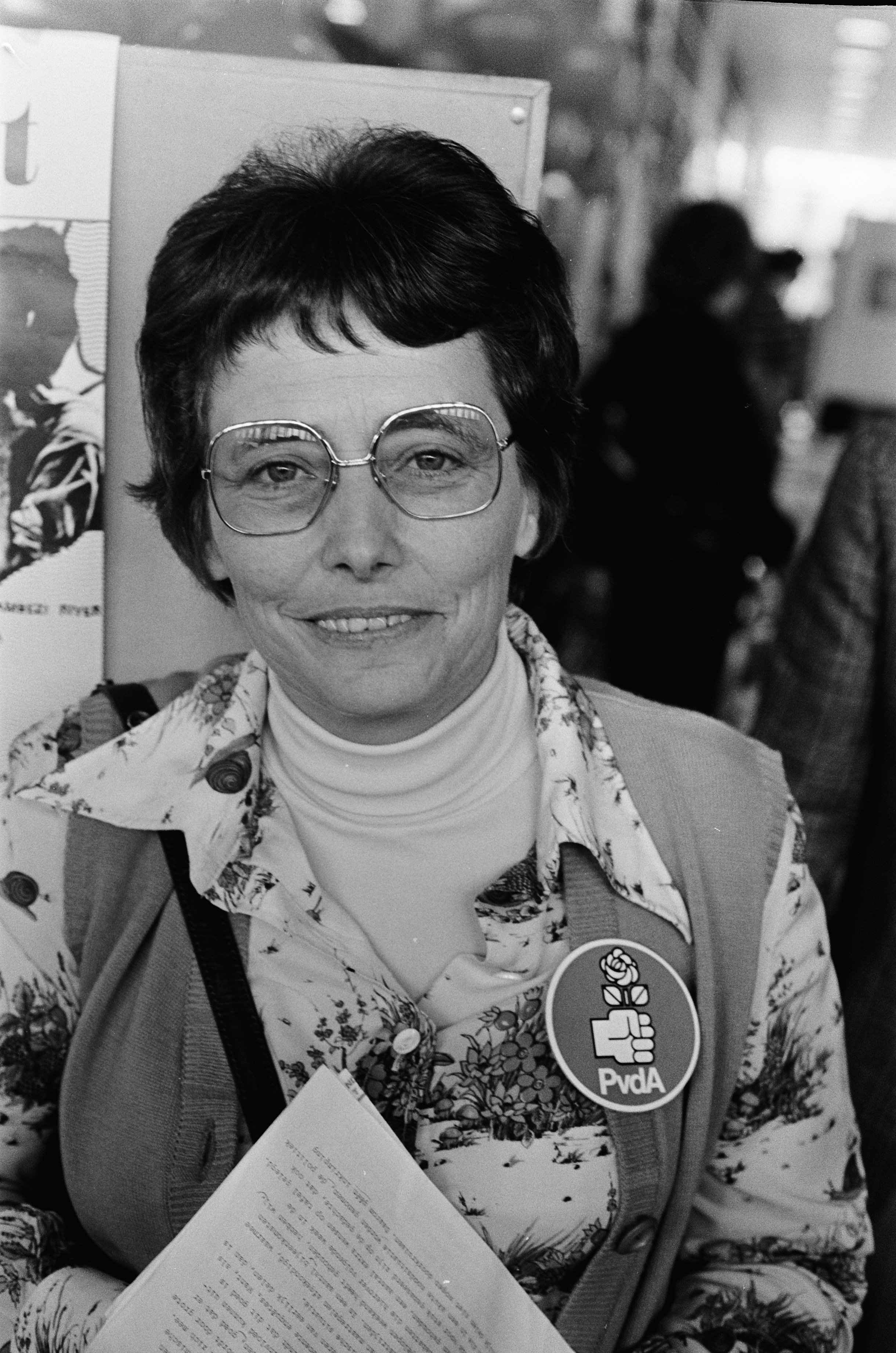 Collectie / Archief : Fotocollectie Anefo Reportage / Serie : Congres PvdA over vrede en veiligheid in RAI Beschrijving : Ien van den Heuvel Datum : 10 april 1975 Locatie : Amsterdam, Noord-Holland Trefwoorden : congressen, parlementariërs, politieke partijen, portretten Persoonsnaam : Heuvel, Ien van den Fotograaf : Bert Verhoeff / Anefo Auteursrechthebbende : Nationaal Archief Materiaalsoort : Negatief (zwart/wit) Nummer archiefinventaris : bekijk toegang 2.24.01.05 Bestanddeelnummer : 927-8638